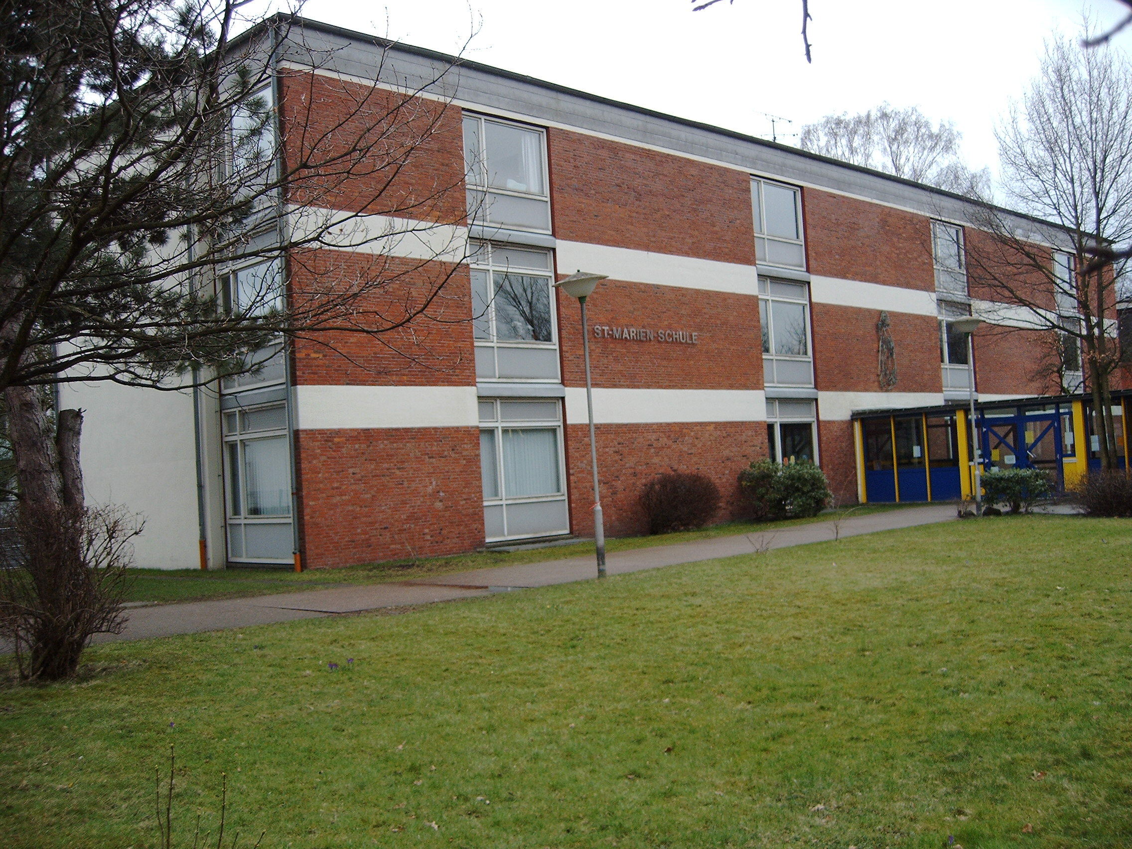 Die St.-Marien-Schule in der Hauffstraße in Bremen-Walle